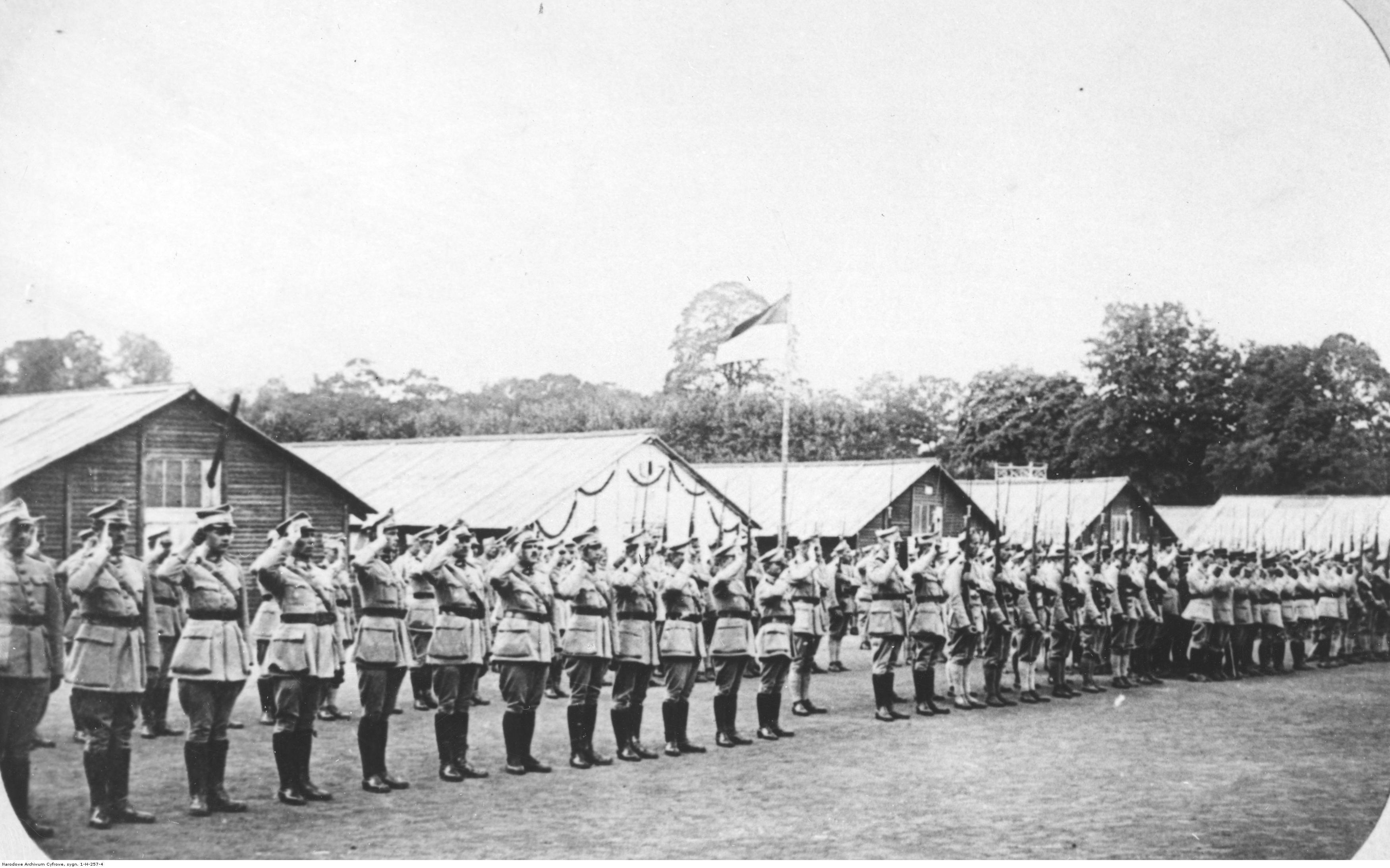 Armia polska we Francji - ośrodek wyszkolenia w Quintin. Przegląd szkoły podoficerskiej. Koncern Ilustrowany Kurier Codzienny - Archiwum Ilustracji. Sygnatura: 1-H-257-4